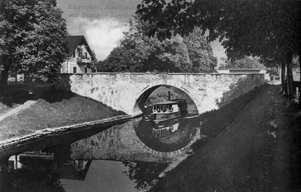 Die Steinerne Brücke über den Lendkanal mit dem Dampfschiff Loretto I, um 1880 - Stone bridge above the Lend chanel with steamer Loretto I (around 1880) 20:18, 2. Jan 2006 Eixi 1000 x 639 (299771 Byte) (* Bildbeschreibung: Die Steinerne Brücke über den Lendkanal mit dem Dampfschiff Loretto I, um 1880 * Quelle: Scan aus Hansgeorg Prix: "Klagenfurt einst", Klagenfurt 1993 * Scan: ~~~~ )